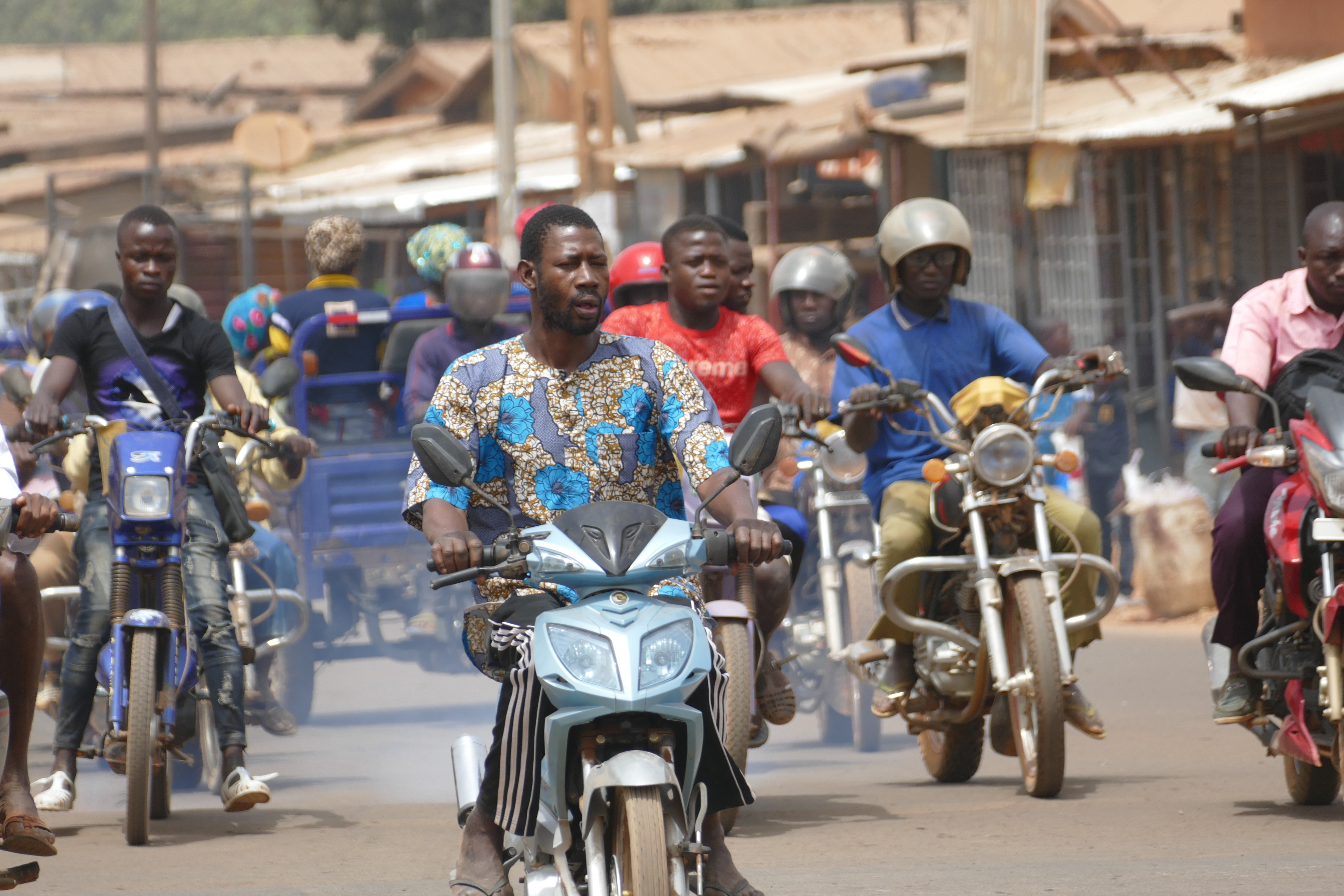 Les Population de la ville de Korhogo se déplace en majorité à Moto This is an image with the theme "Africa on the Move or Transport" from: Ivory Coast